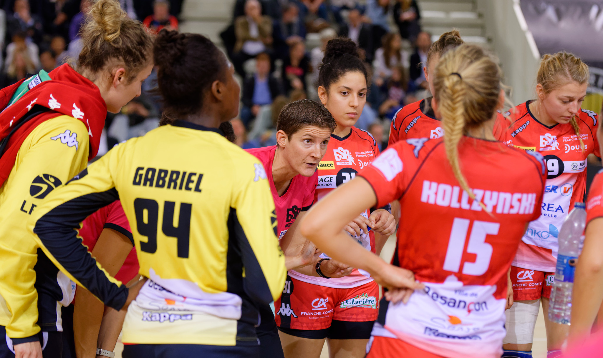 Rencontre de championnat entre Issy Paris Hand et ES Besançon. A Issy Les Moulineaux, le 26 octobre 2016.